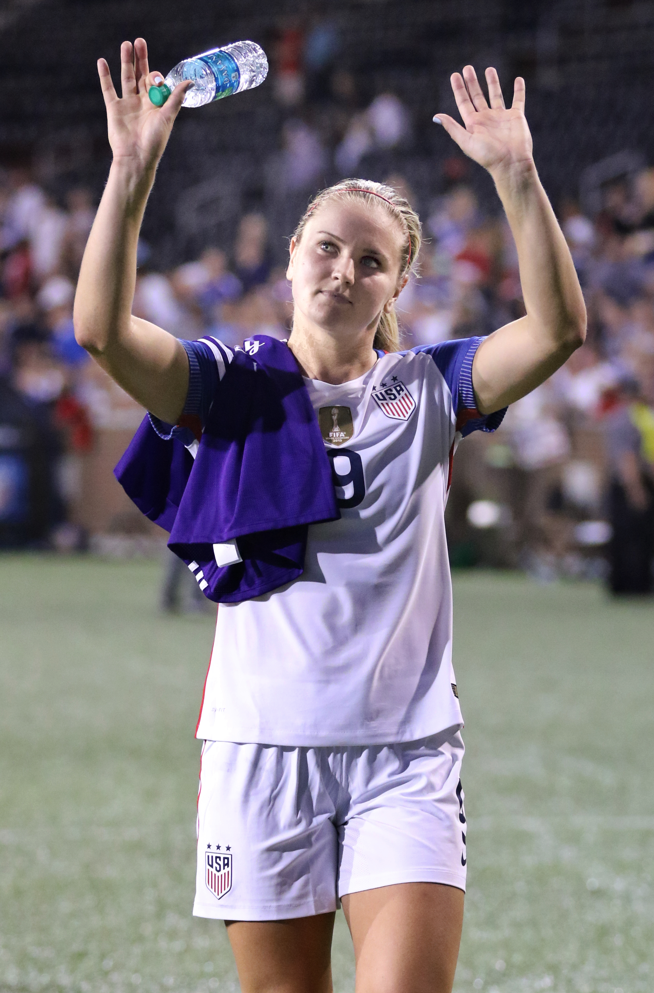 LindseyHoran